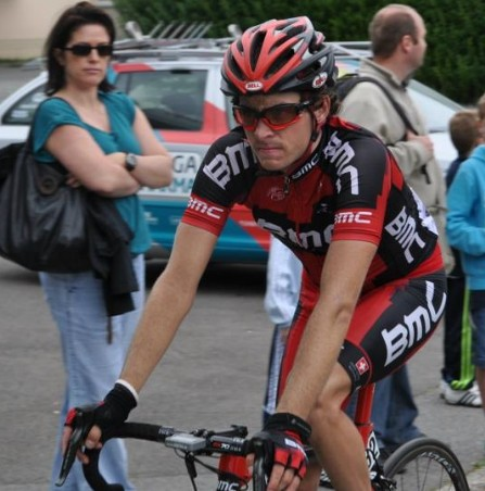 Yannick Eijssen